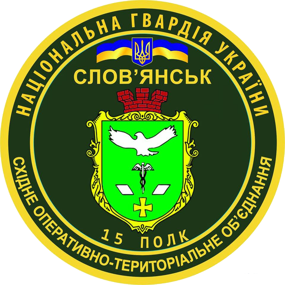 Нарукавний знак, 15 окремий полк, Національна гвардія України